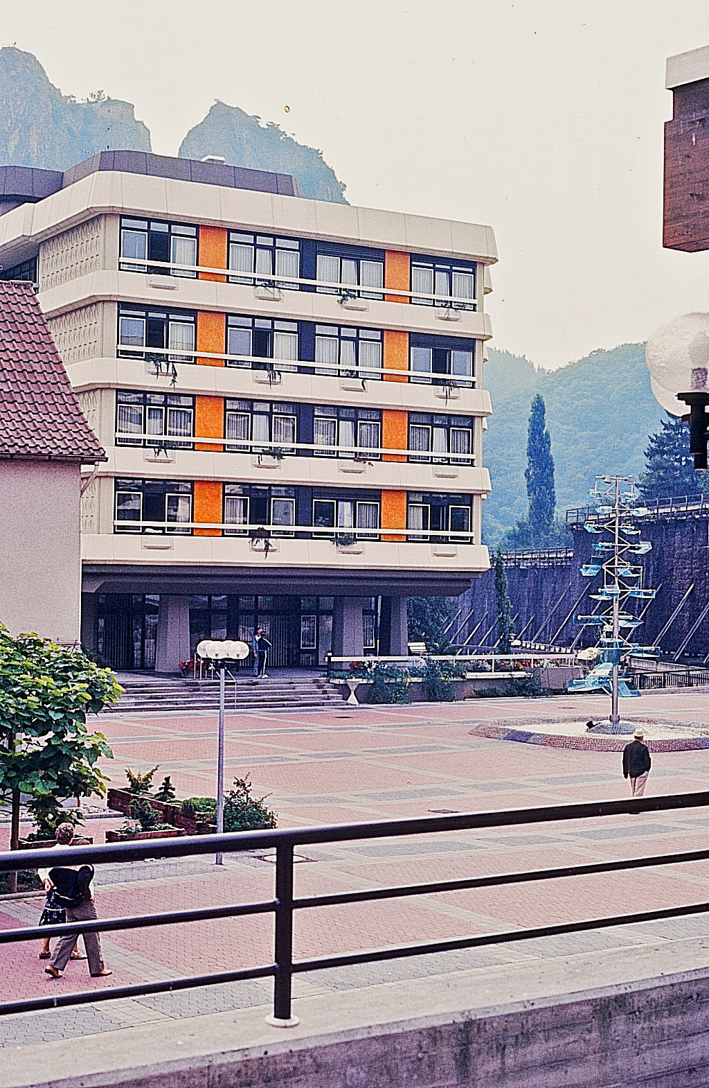 Das Erweiterungsgebäude der Fachklinik in der Stadt, 1979. Foto: DRV Rheinland-Pfalz.